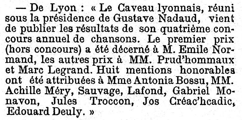 Annonce des résultats du concours annuel du Caveau lyonnais.